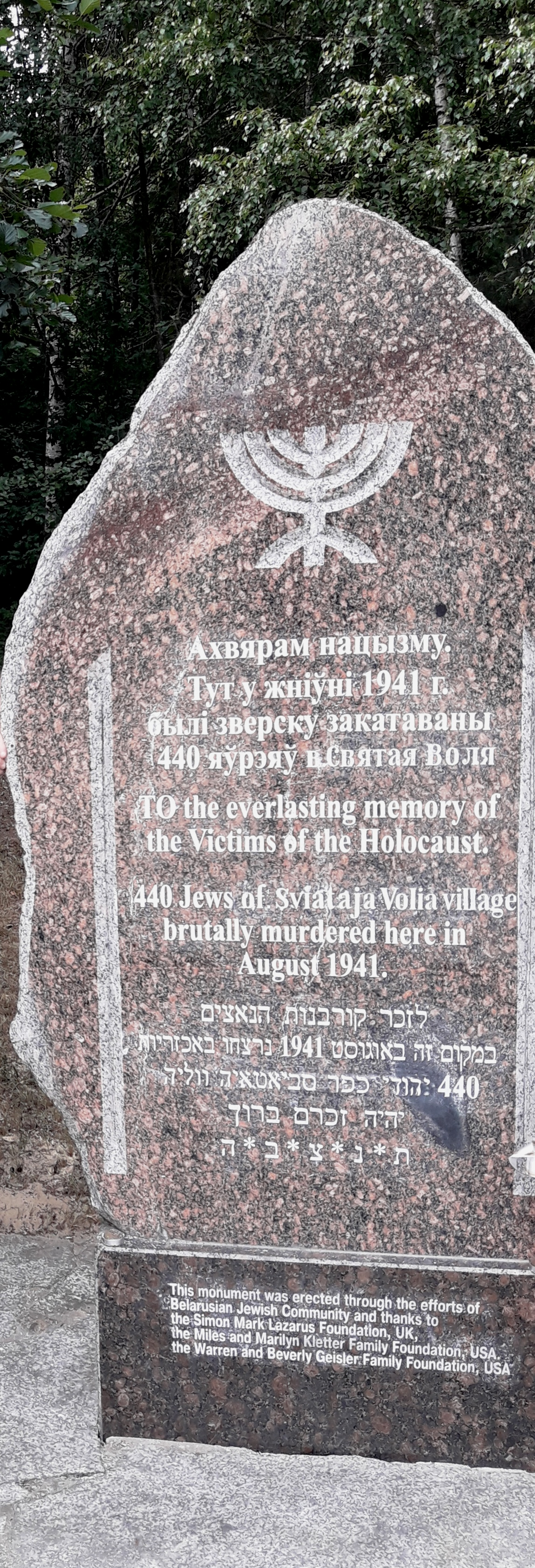 Памятник на месте убийства 440 евреев в деревне Святая Воля в августе 1941 года.